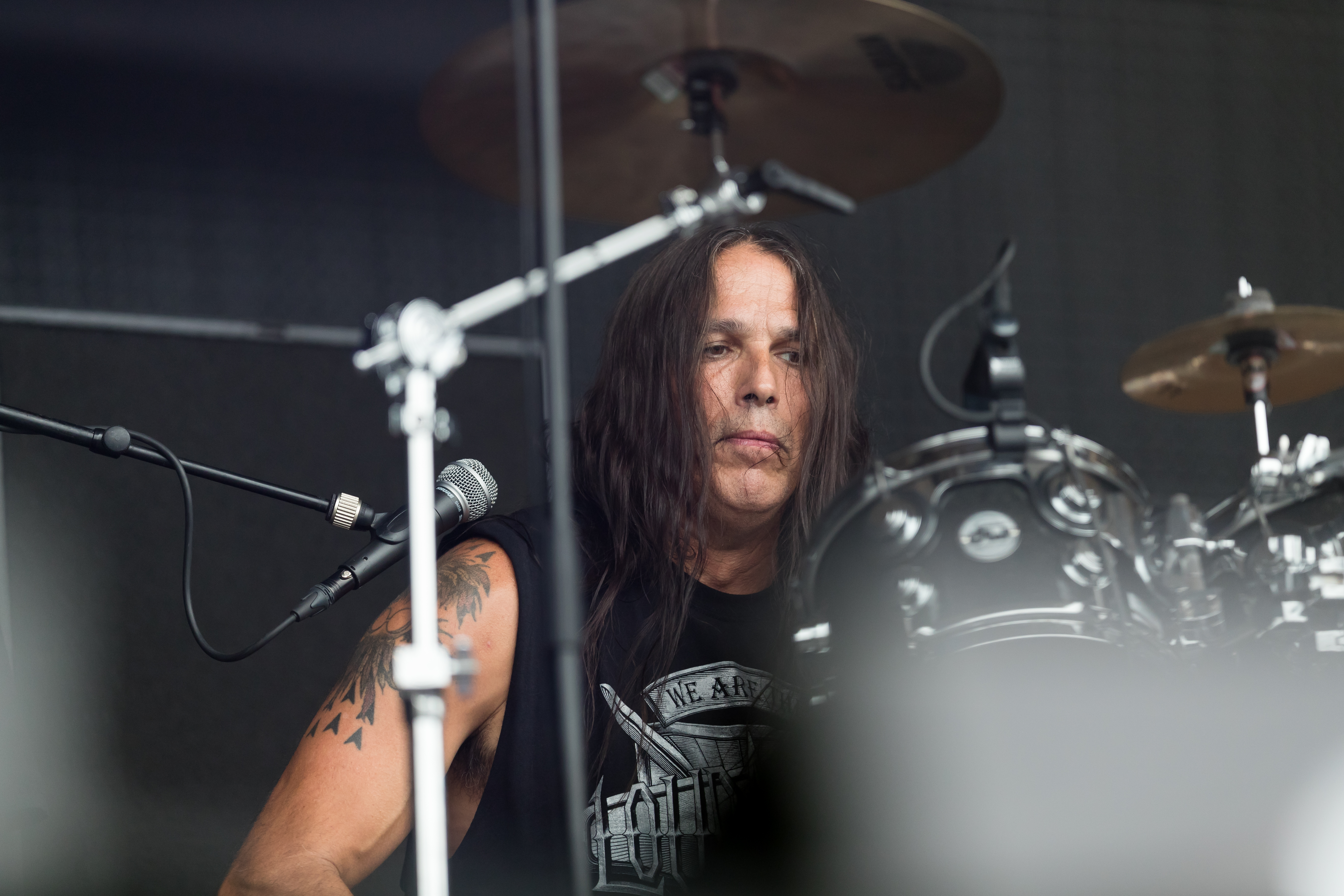 Sanctuary during Wacken Open Air at Schleswig-Holstein, Wacken, , Germany on 2017-08-04, Photo: Sven Mandel